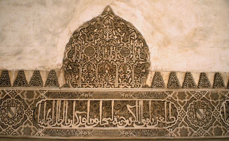 Details der Verzierungen